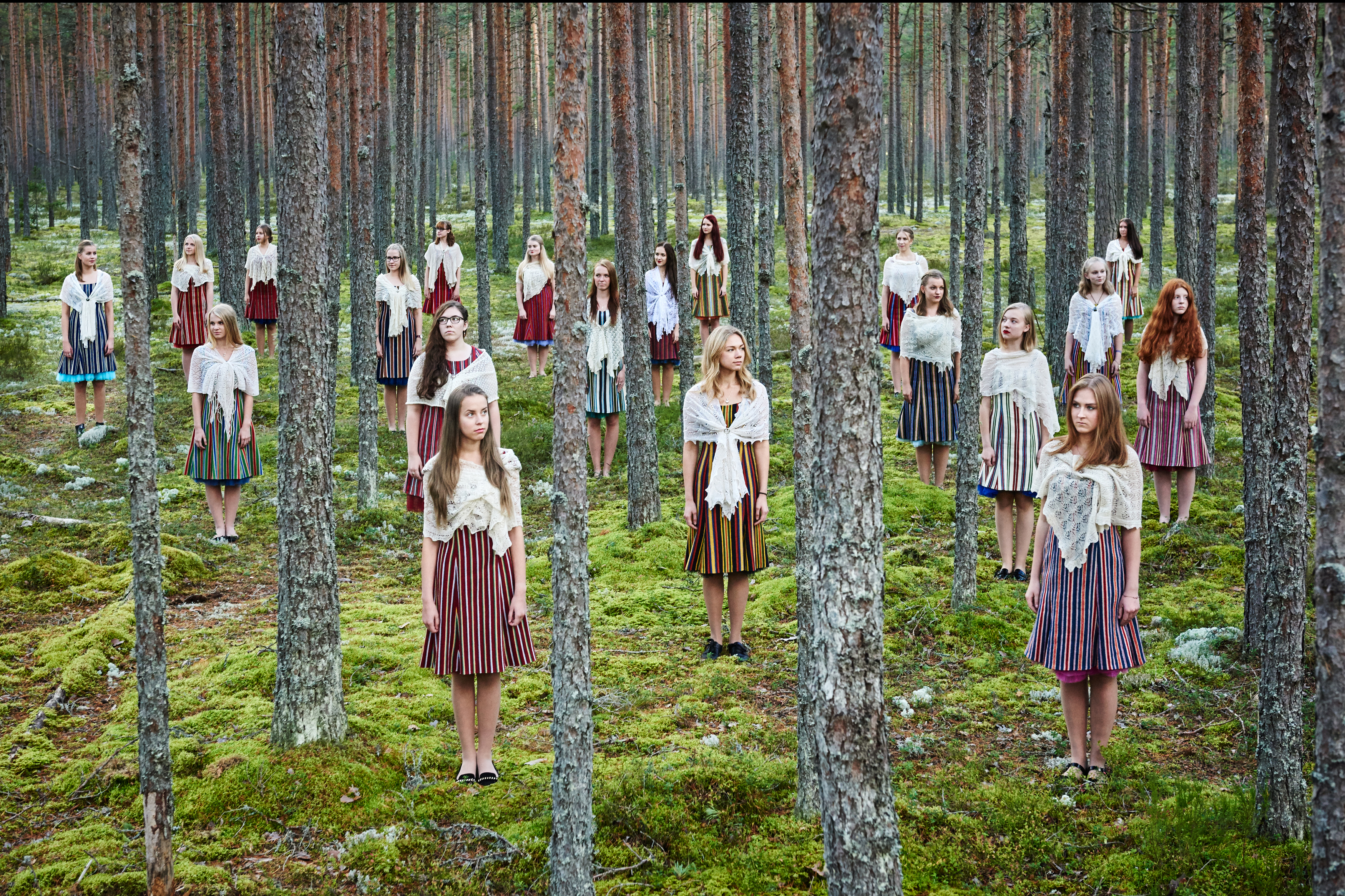 ETV tütarlastekoor